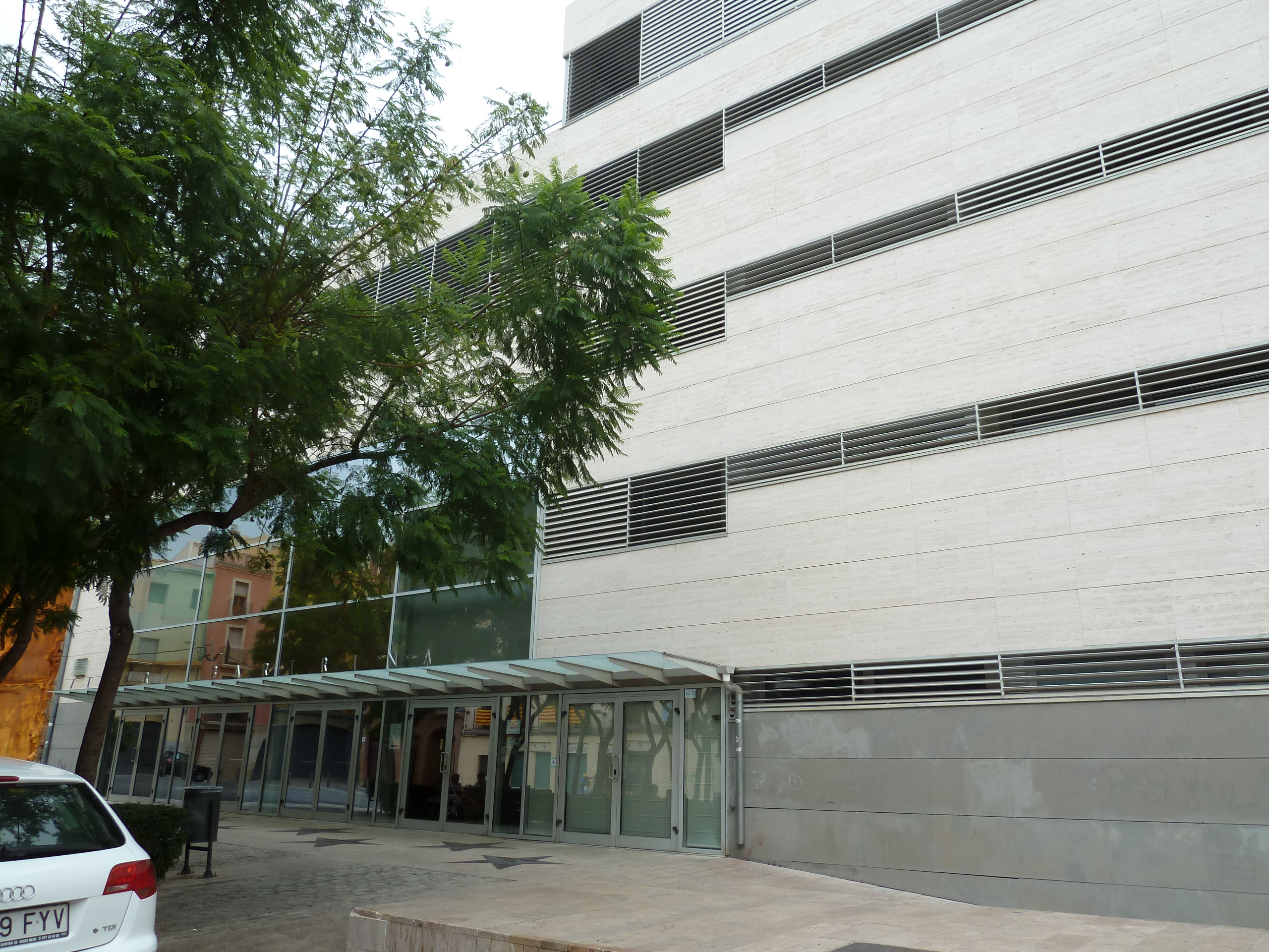 Reus